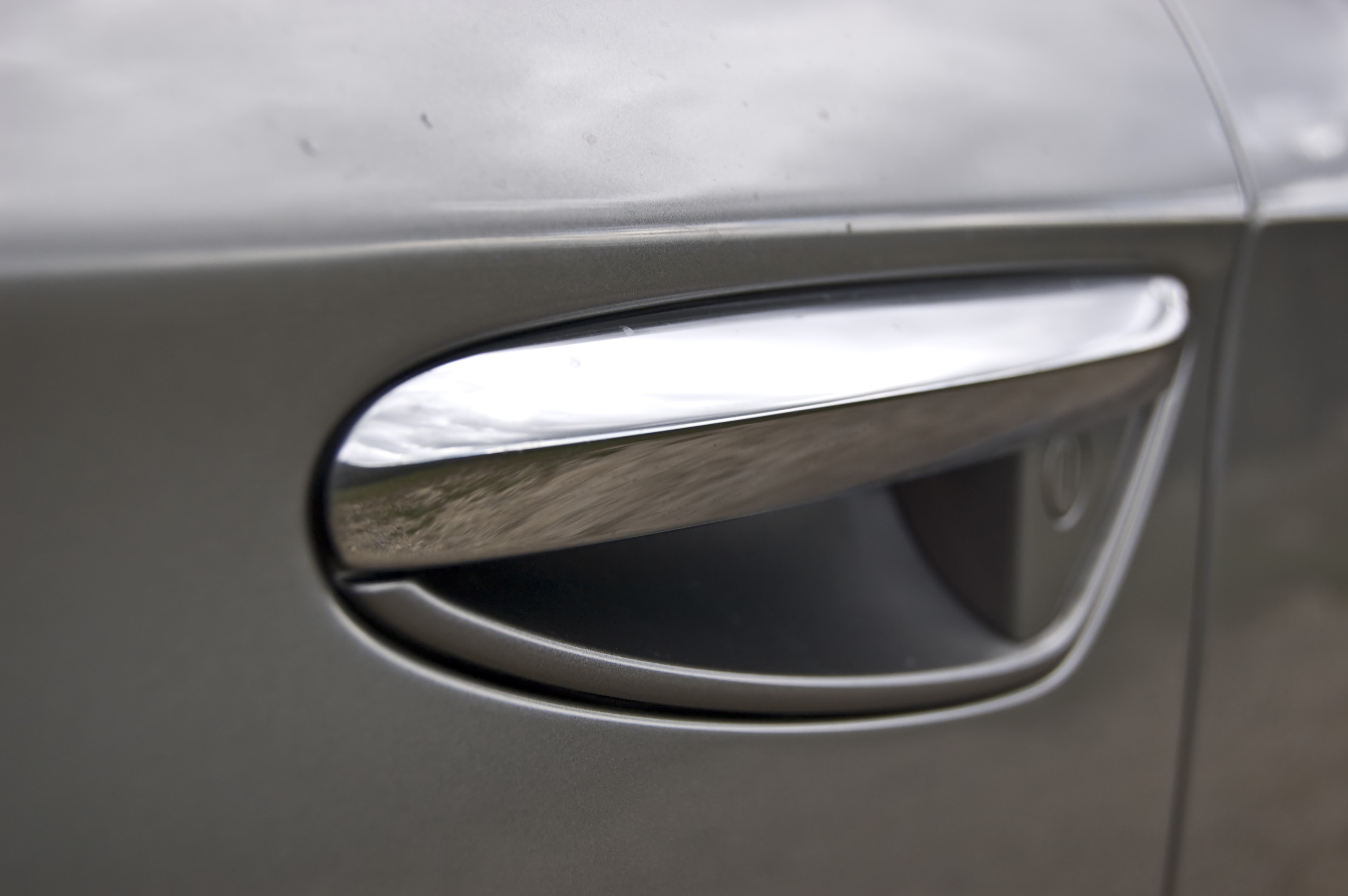 Alfa 159 2.0 JTDm ECO Elegante, prueba en Diariomotor